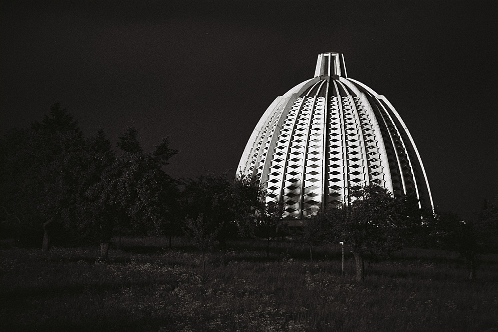 Haus der Andacht (Europäischer Baha'i-Tempel, Hofheim am Taunus, Stadtteil Langenhain, Deutschland), GNU-FDL, Bildquelle: Michael Paul Gollmer (selbst fotografiert)